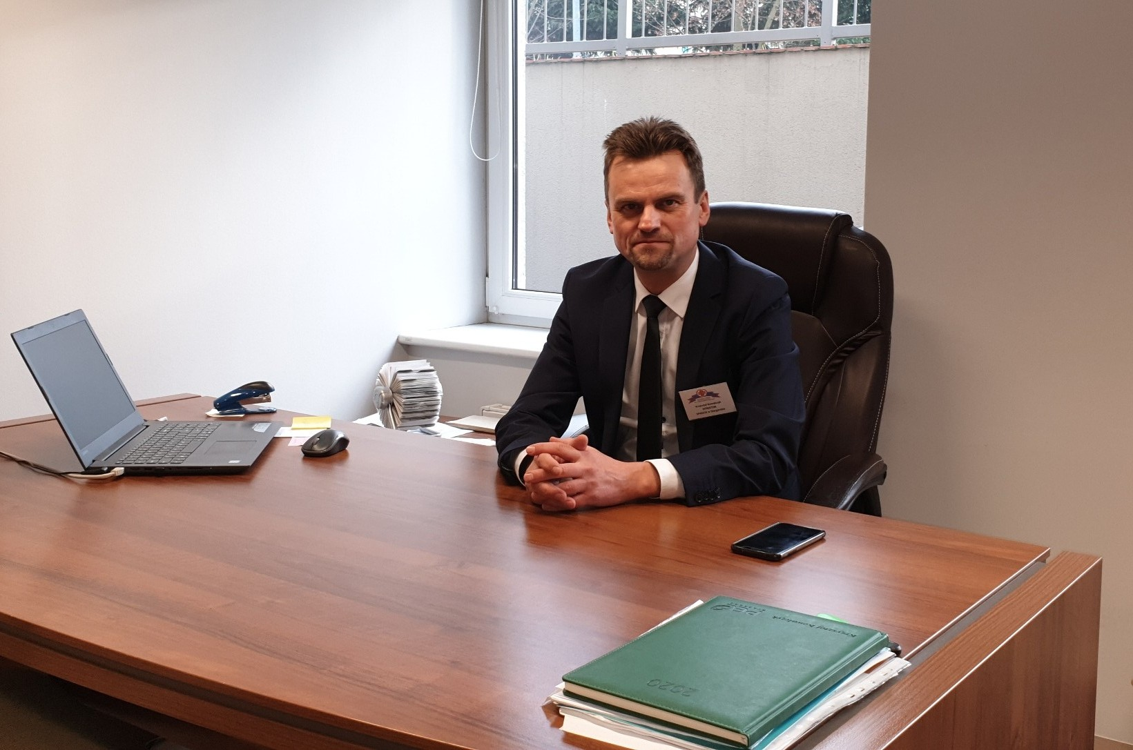 Dyrektor Szpitala Powiatowego w Stargardzie - Krzysztof Kowalczyk